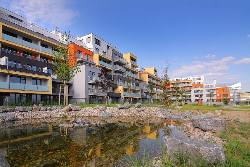 Britská čtvrť - nové etapy - zeleň